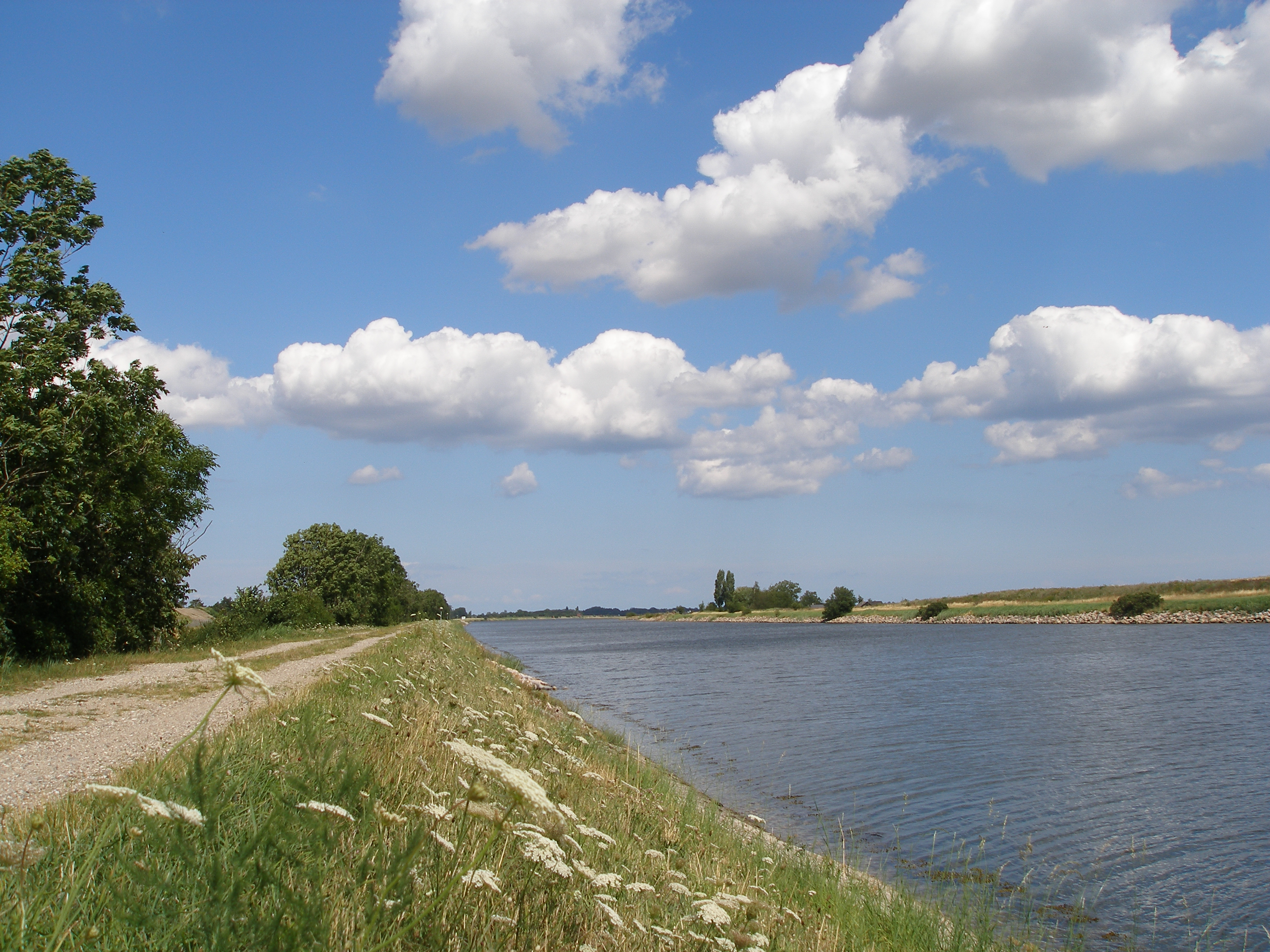 kanalvej ved odense kanal